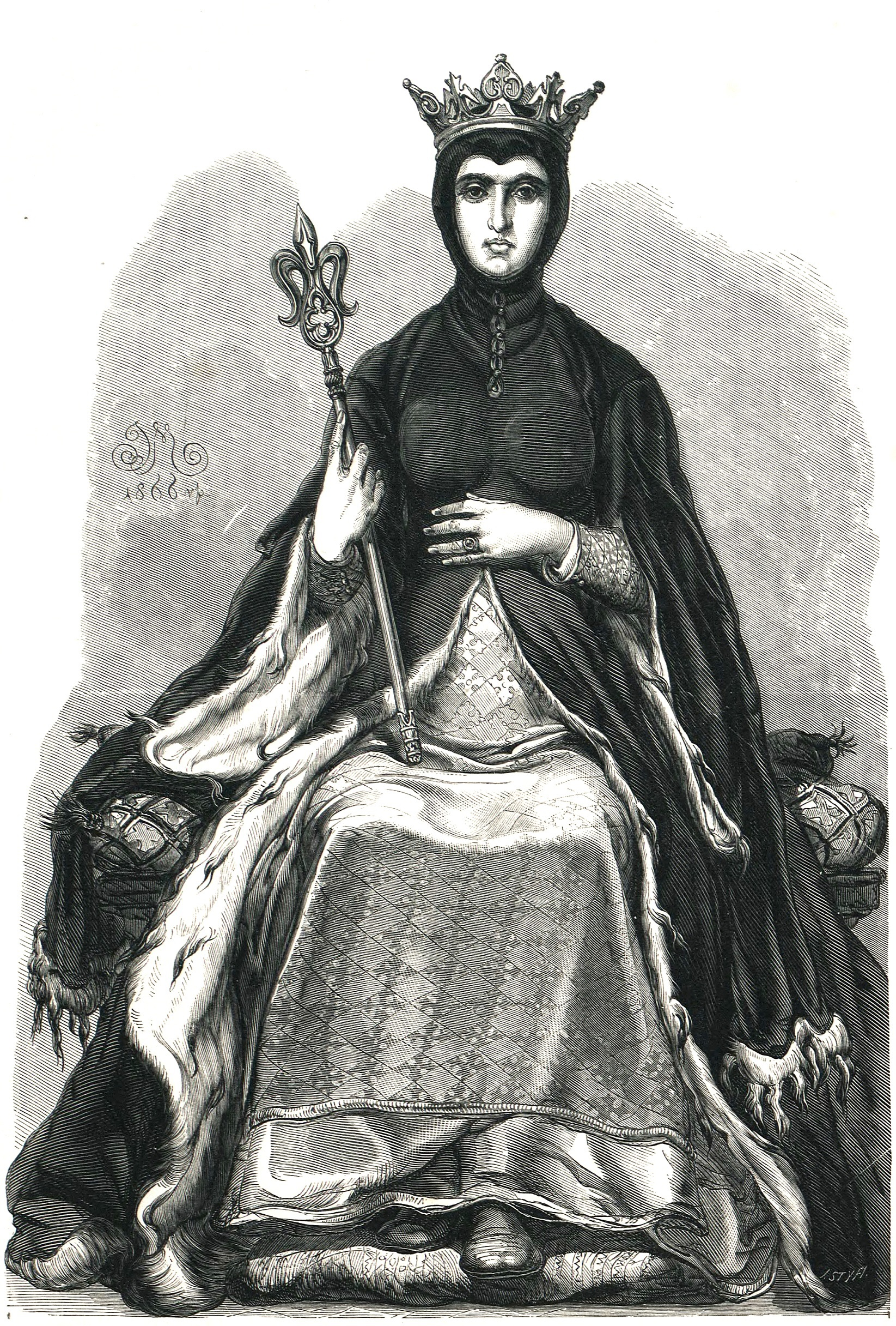 Grzymisława (1189-1258) – księżniczka ruska, księżna krakowska